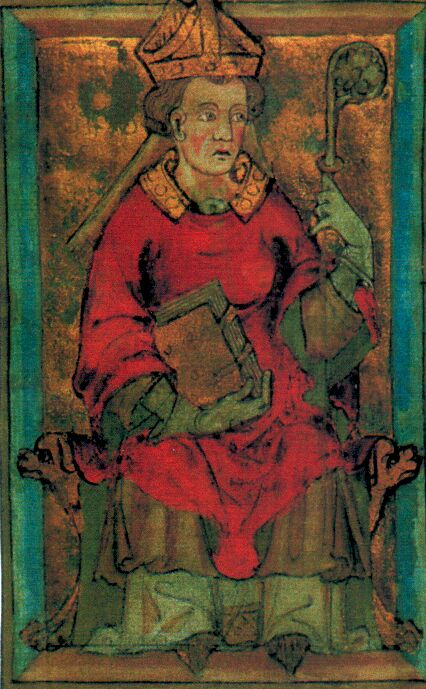 Nicolaus von Ketelhodt